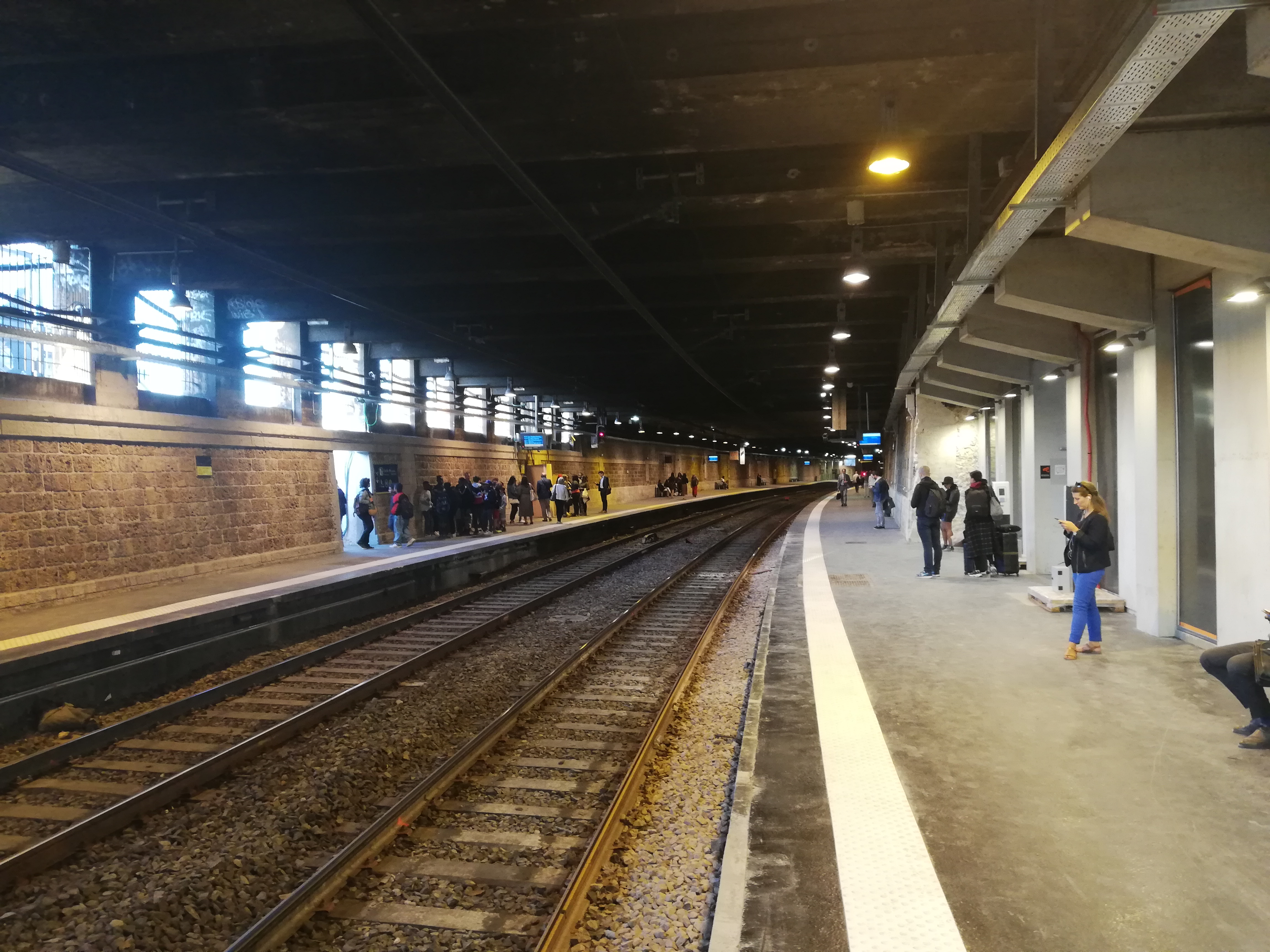 Quais de la gare du Pont de l'Alma - Musée du quai Branly – Jacques Chirac, après sa réouverture, en septembre 2019.